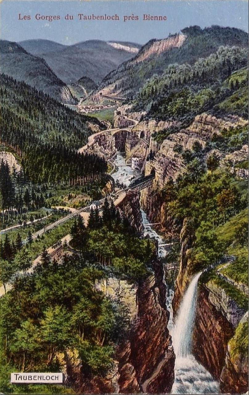 Einer der schwierigsten Bauabschnitte des Netzes der Jura bernois war das 1874 mitten durch die Taubenlochschlucht gebaute Teilstück von Biel und Reuchenette-Péry mit fünf Tunnels.